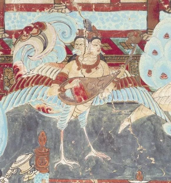 安西榆林窟第25窟《观无量寿经变》壁画局部